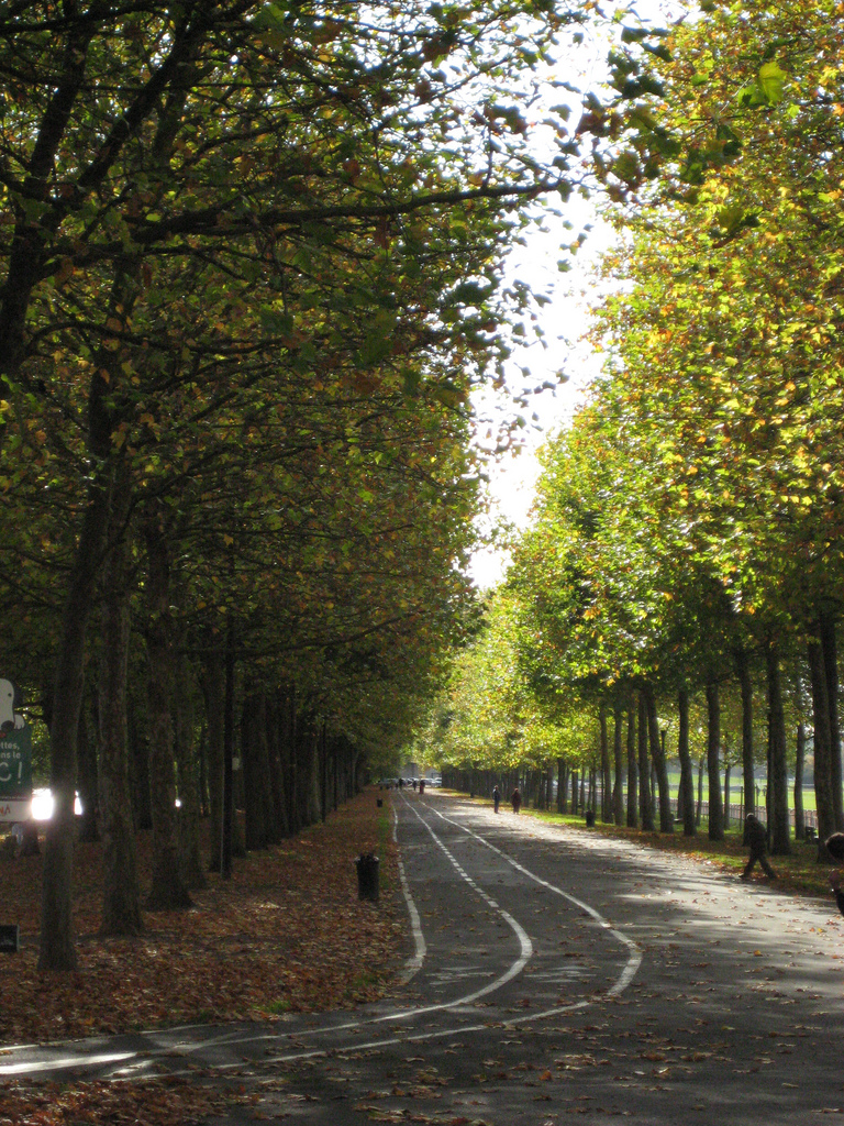 Cours Kœnig (ancien Grand cours) planté au XVIIe siècle le long de l'Orne à Caen